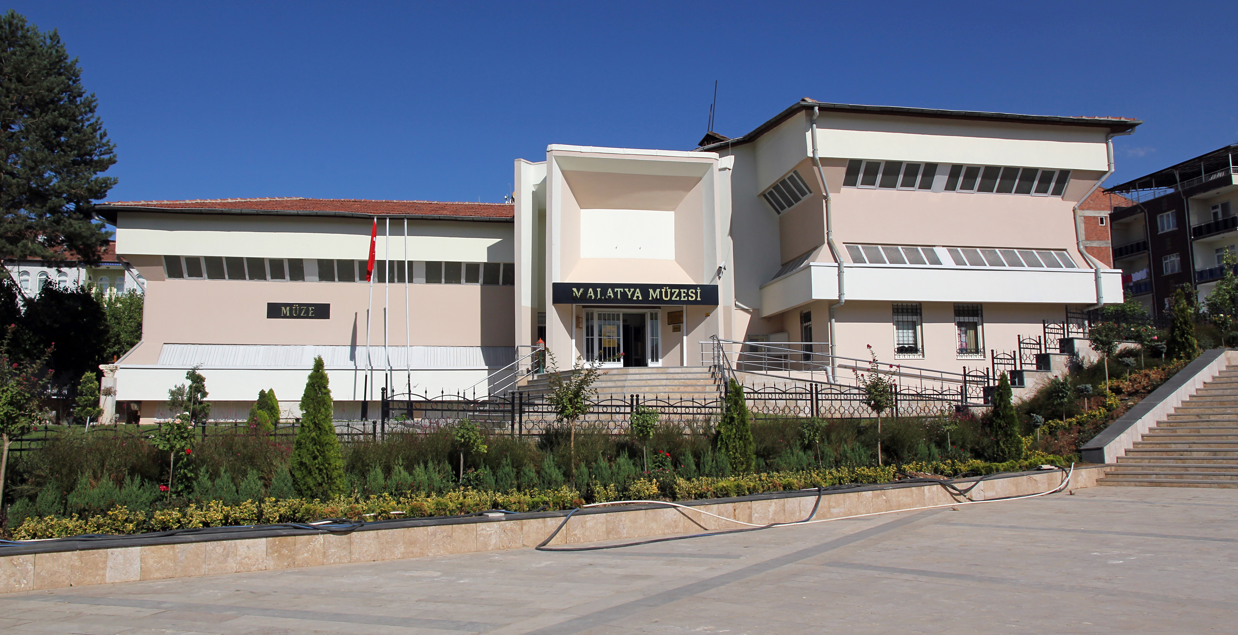 Archäologisches Museum Malatya, Türkei